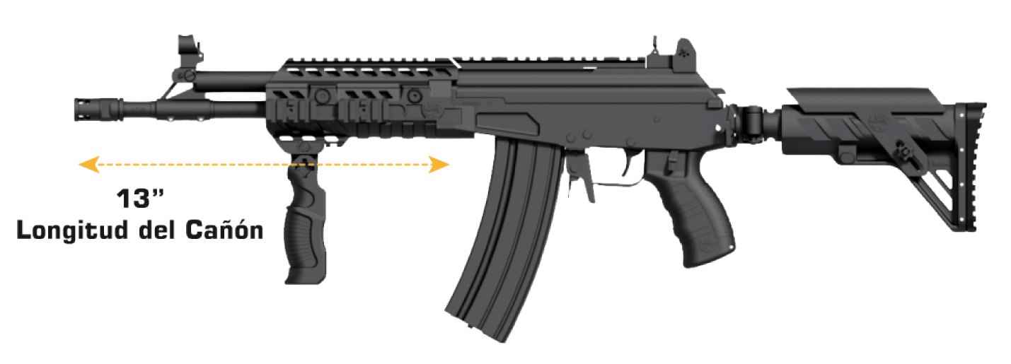 Indumil: Industria Militar de Colombia